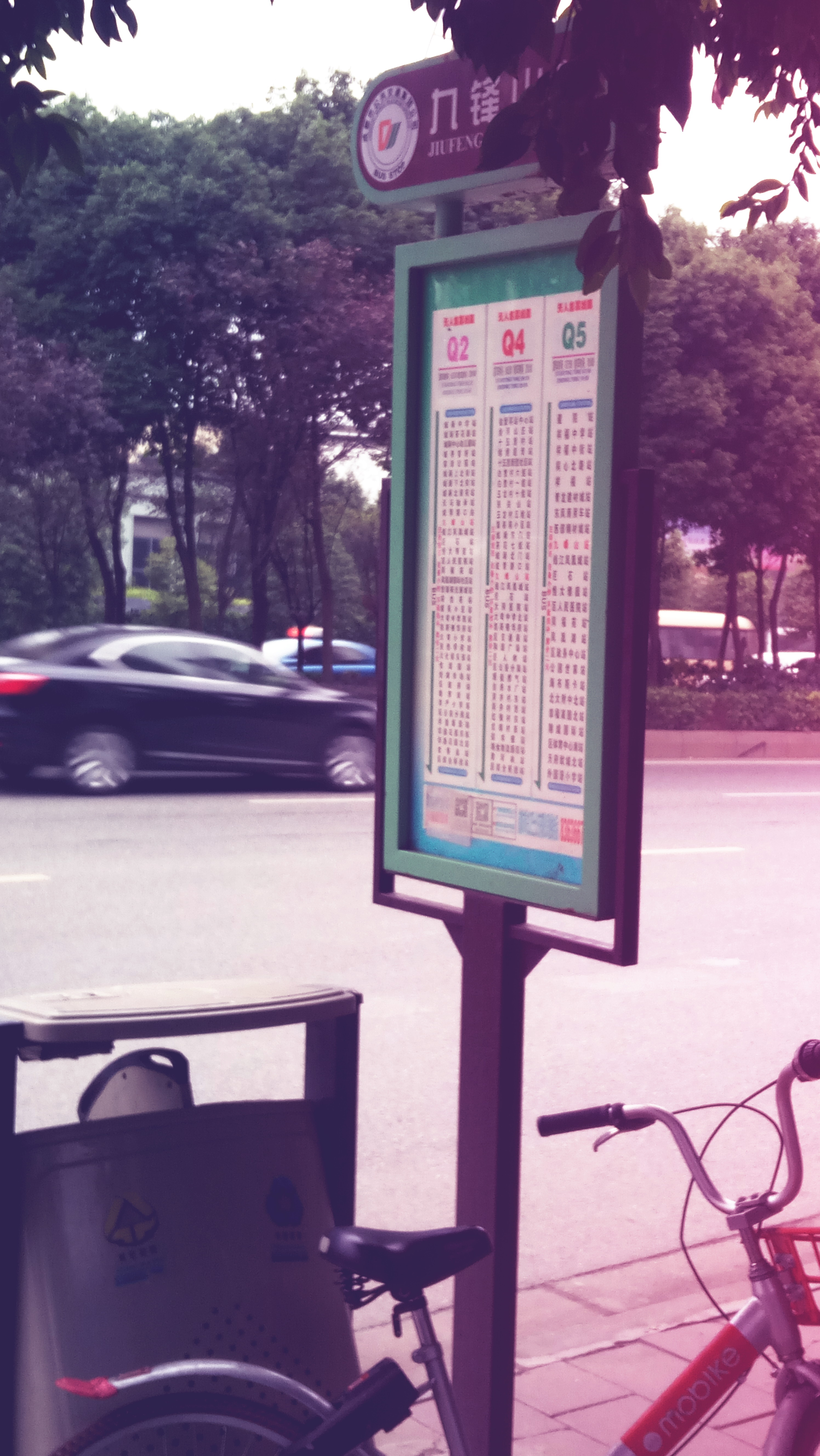 中文（中国大陆）: 成都公交集团青白江巴士公交公司的站牌